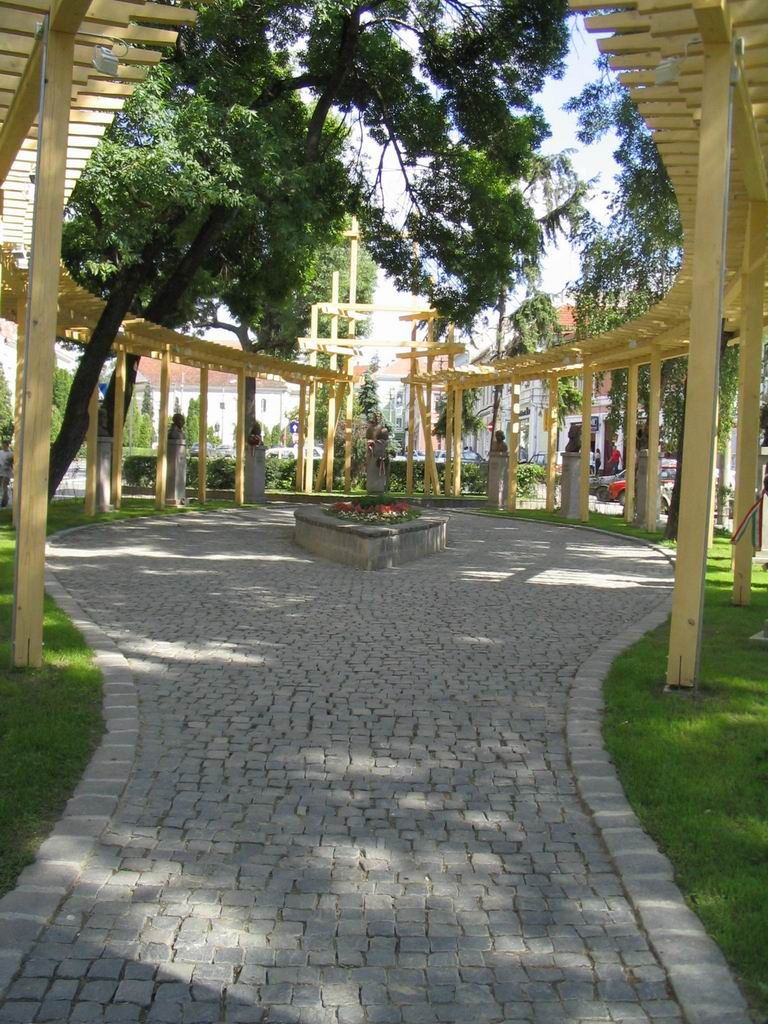 Szoborpark, Székelyudvarhely - Erdély